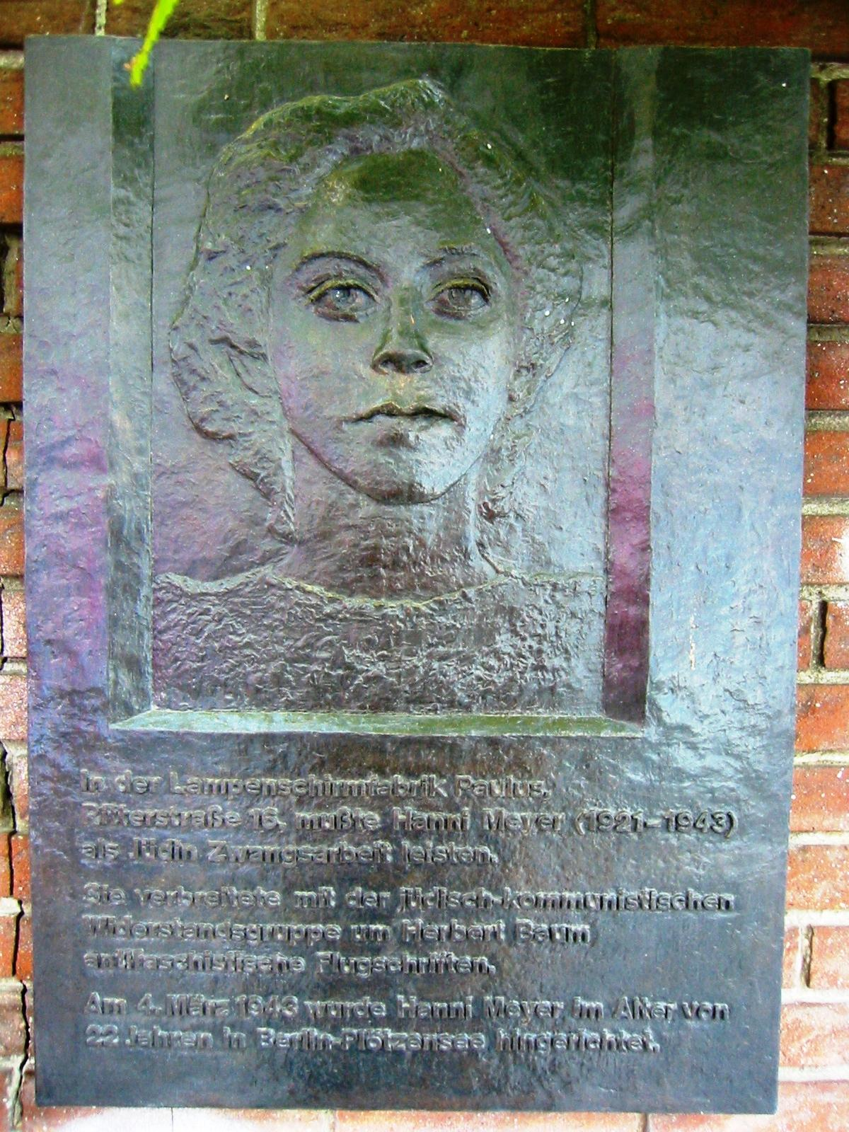 Gedenktafel für Hanni Meyer (1921 - 1943), die in der Lampenschirmfabrik Paulus in der Ritterstraße 16 zur Zwangsarbeit herangezogen wurde.